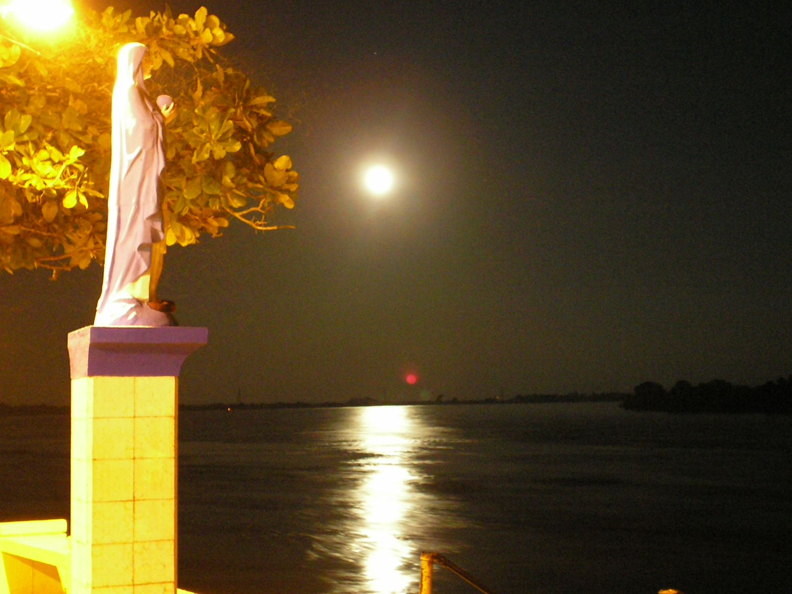 Monumento a la virgen en el muelle fluvial durante una noche de luna llena en El Banco (Magdalena)